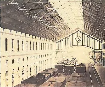 Interior da Estação Ferroviária de Lisboa - Santa Apolónia, em Portugal.